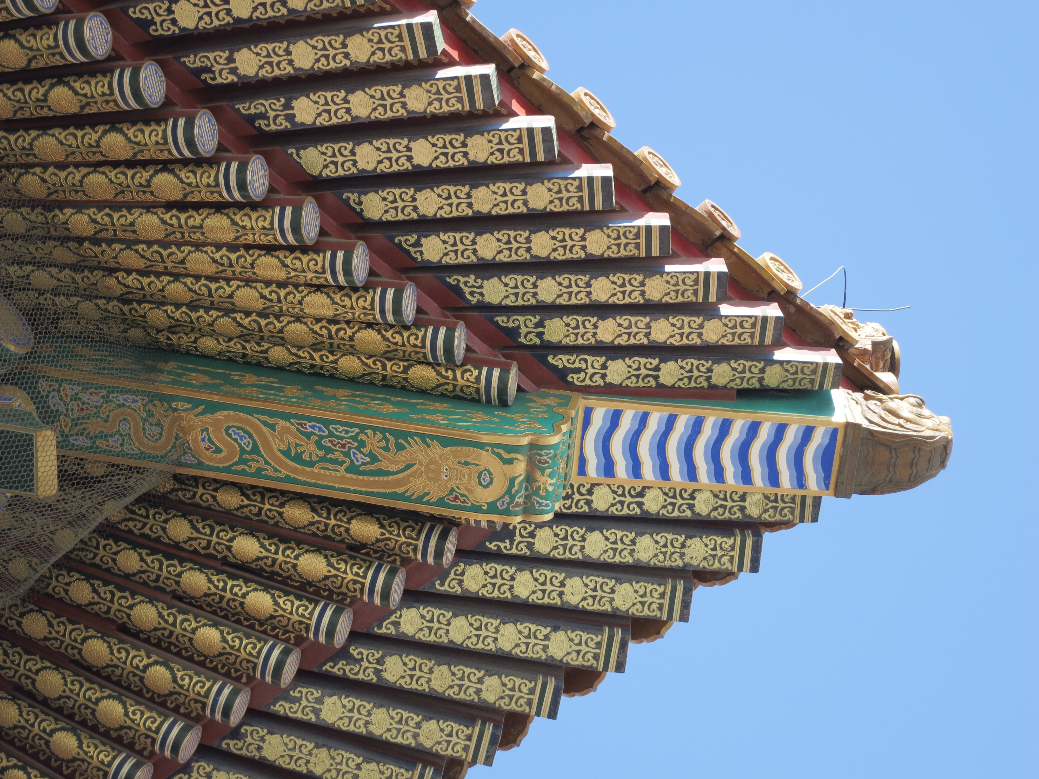 故宮太和殿的轉角出檐